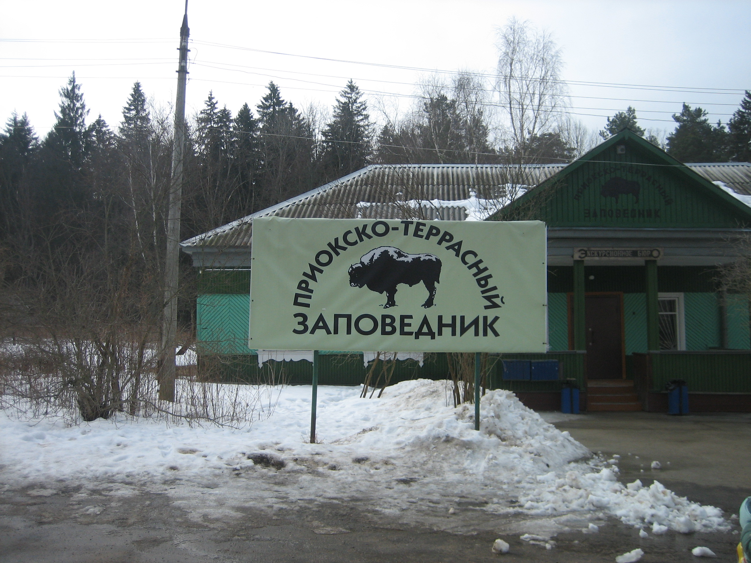 Приокско-Террасный заповедник